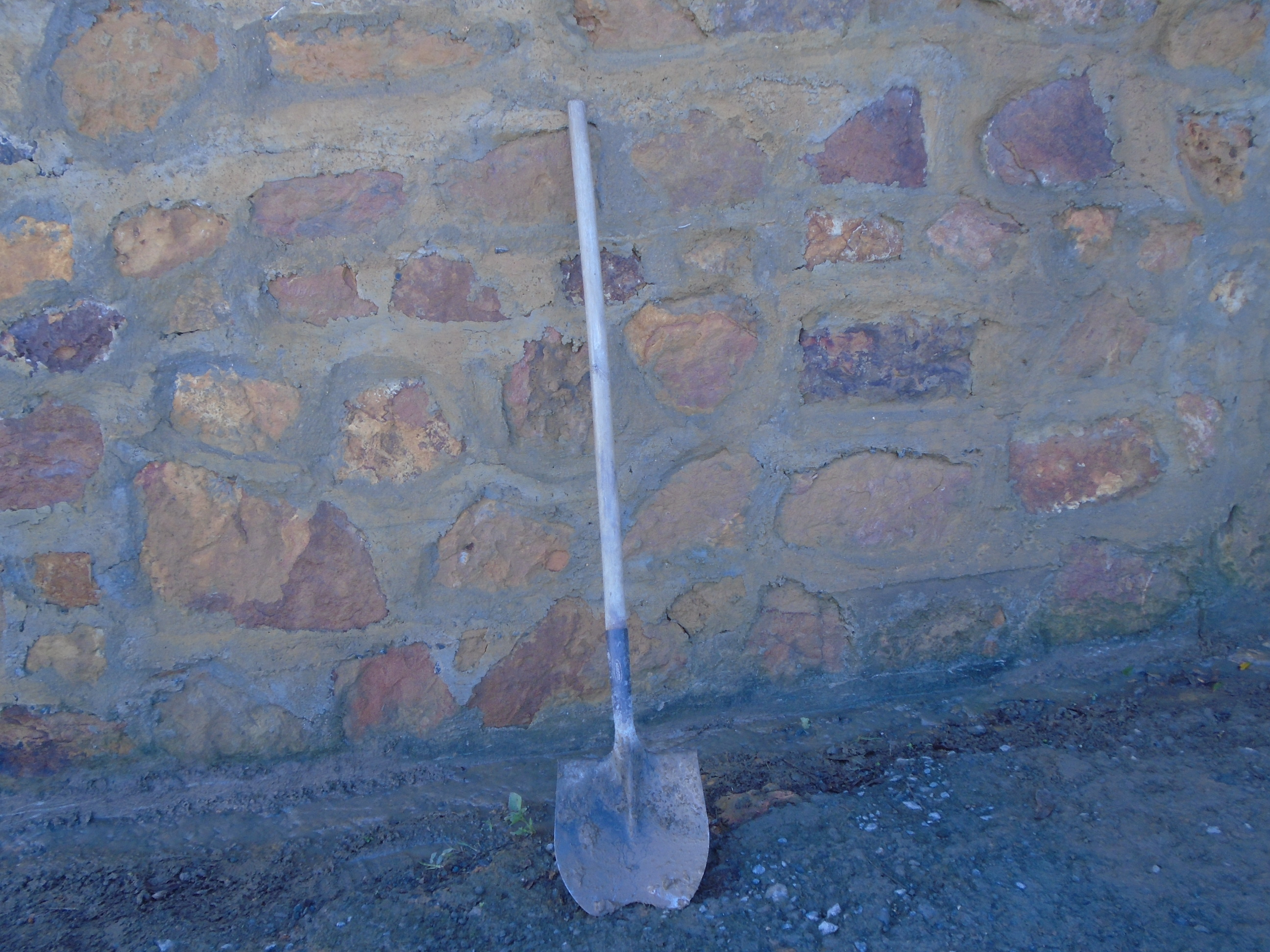 Una pala moderna